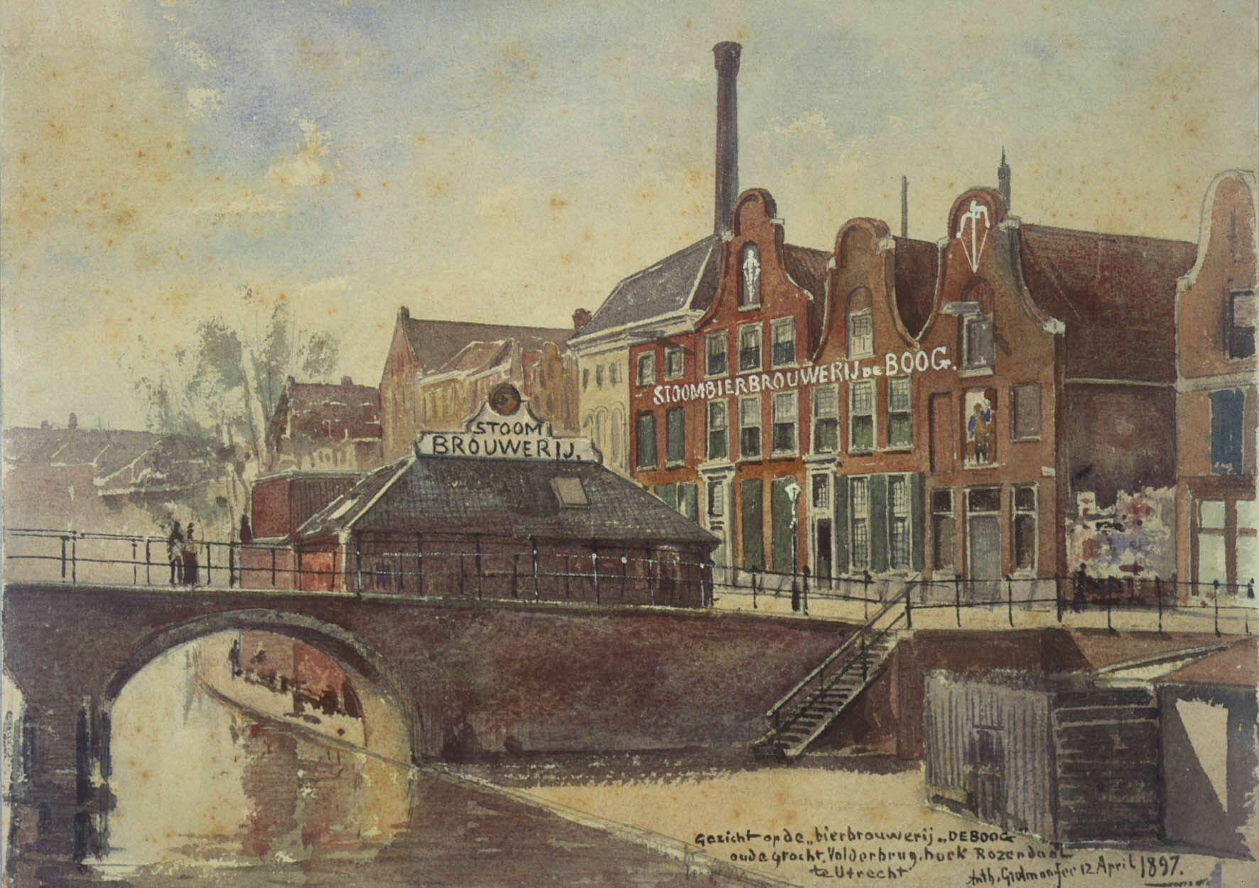 Brouwerij De Boog aan de Oudegracht te Utrecht in 1897, het jaar van de sluiting. Ook zichtbaar een deel van de Vollersbrug.